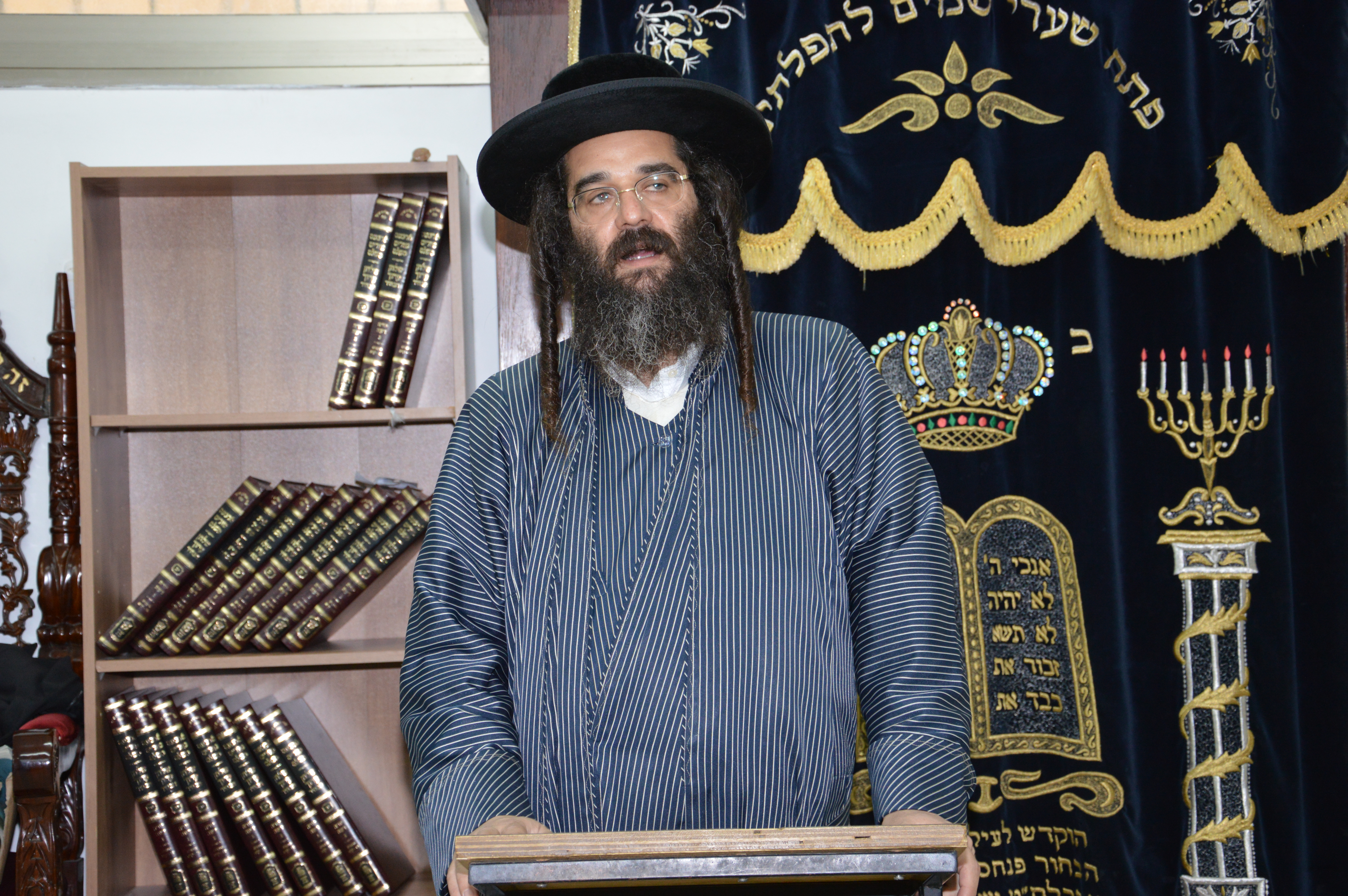 שיעור בכולל בצפת על ידי גאב"ד היכל הוראה הגר"מ ברנדסדורפר שליט"א